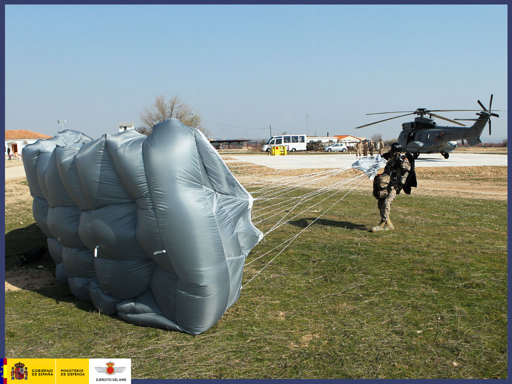 Uno de los integrantes del equipo CCT del EADA tras aterrizar en el Aeródromo de Ablitas